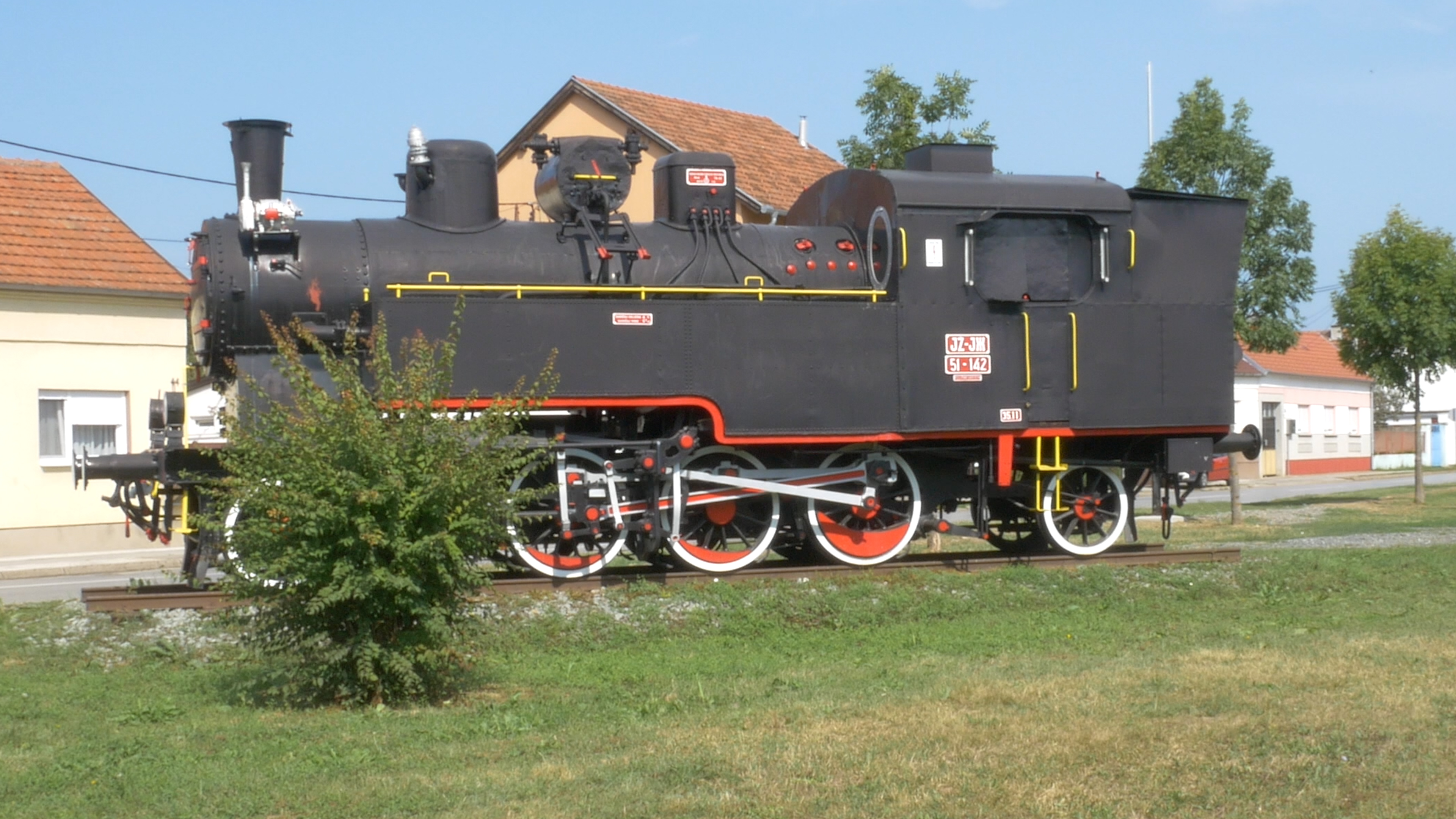 Industrijski park u Slavonskom Brodu